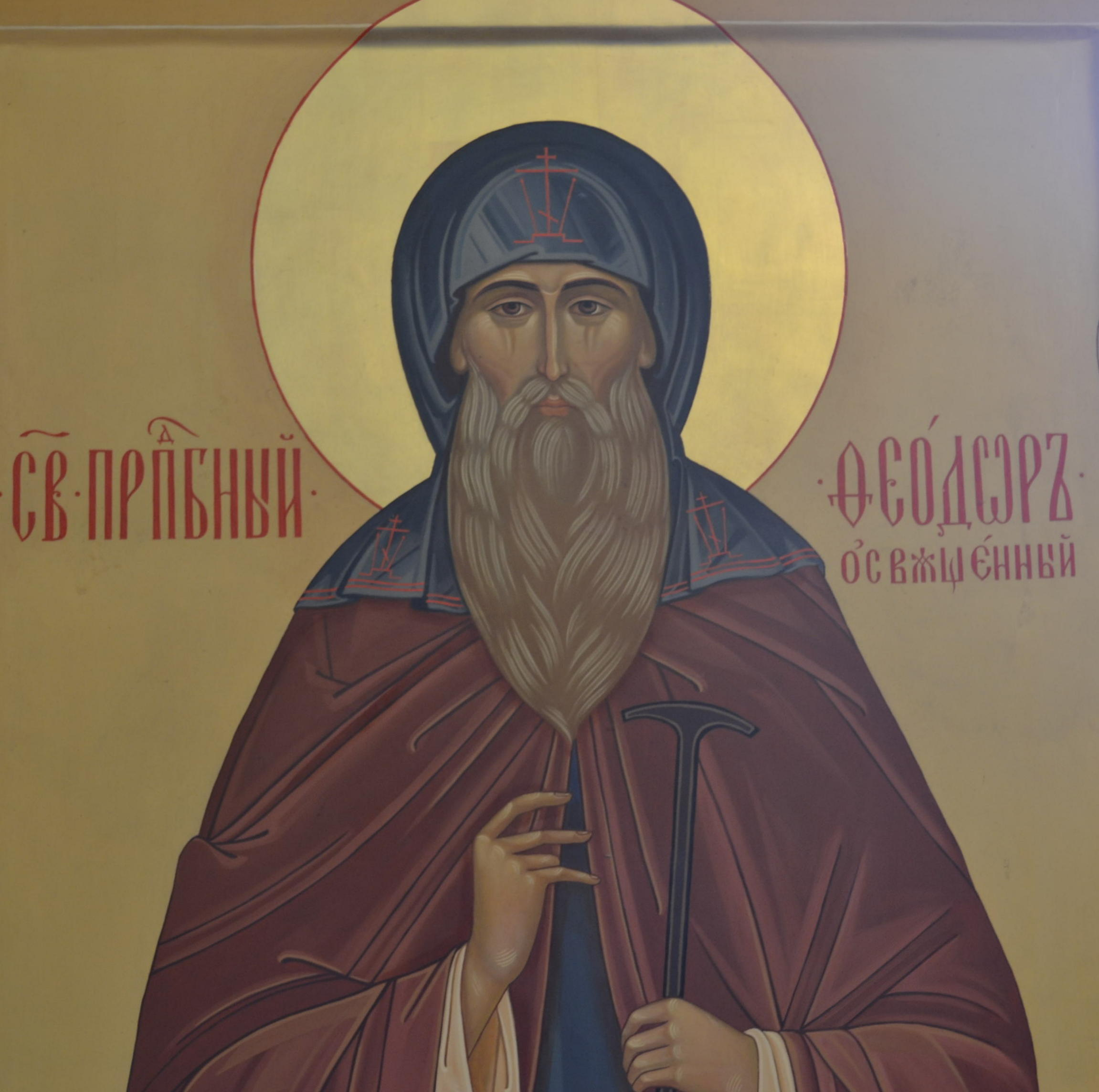 Феодор Освященный (316, Латополь, Египет — 24 апреля 368, Палестина) — христианский святой, авва, ученик Пахомия Великого. Назван «освященным» потому, что первым в своей обители был рукоположен во священники. Почитается в лике преподобных, память совершается в Православной церкви 16 мая (по юлианскому календарю), в Католической церкви 28 декабря.